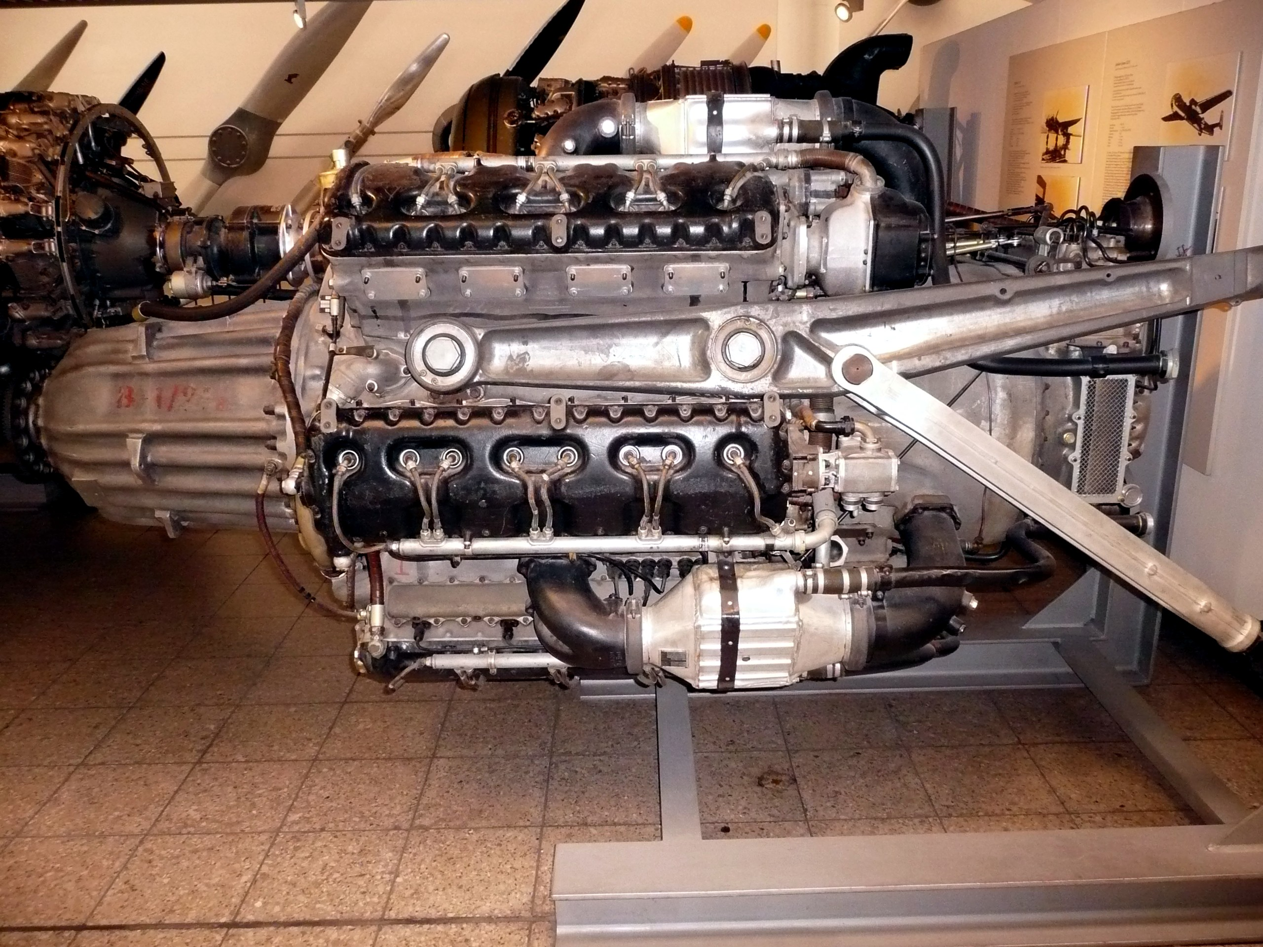 Junkers Jumo 222 E Flugzeugmotor Baujahr 1944 von links gesehen im deutschen Museum München.